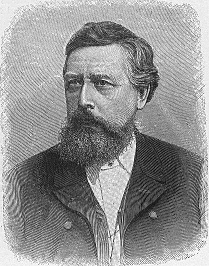 Portrait Wilhelm Liebknecht Lizenz: Public Domain Quelle